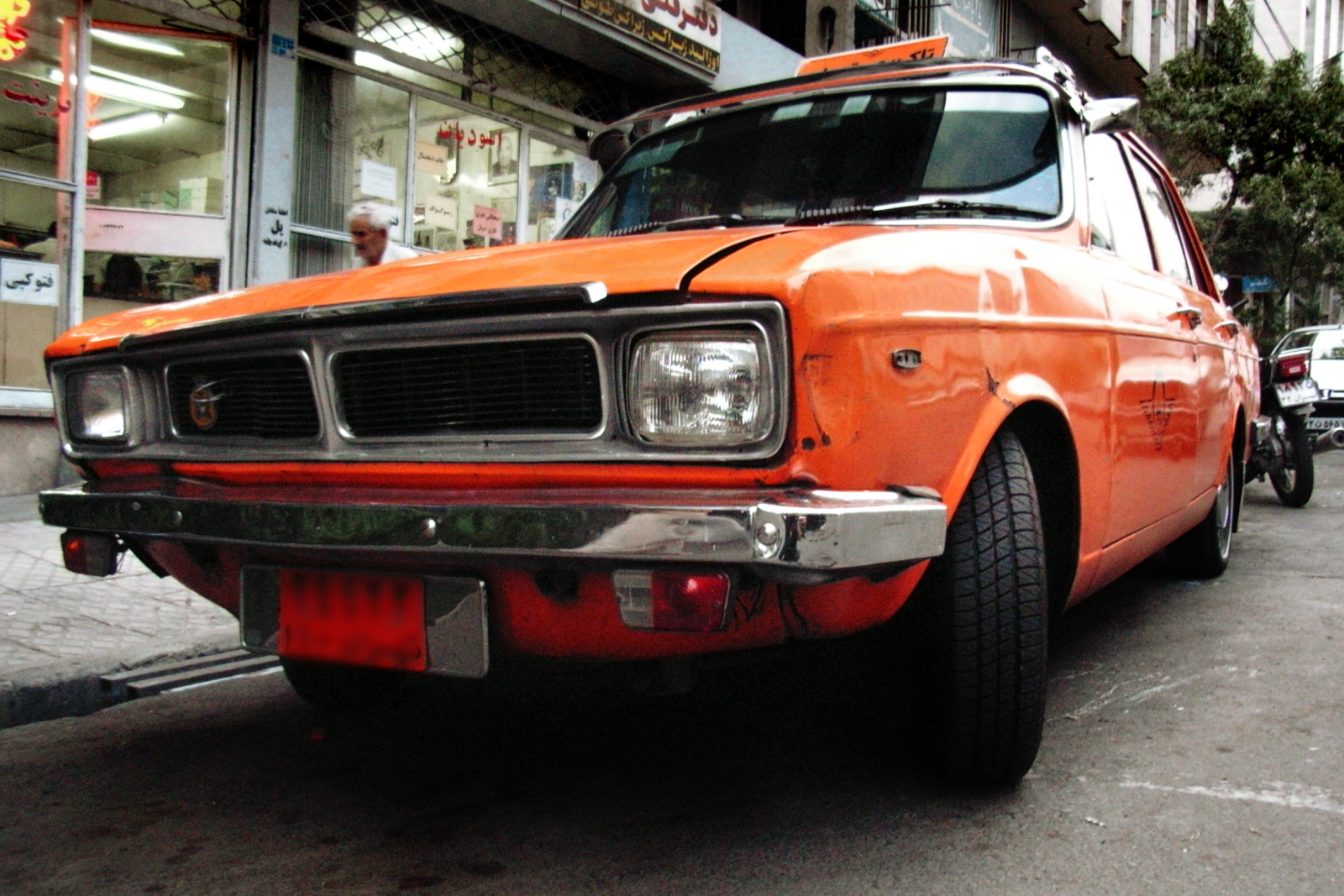 Iranian Paykan Taxi